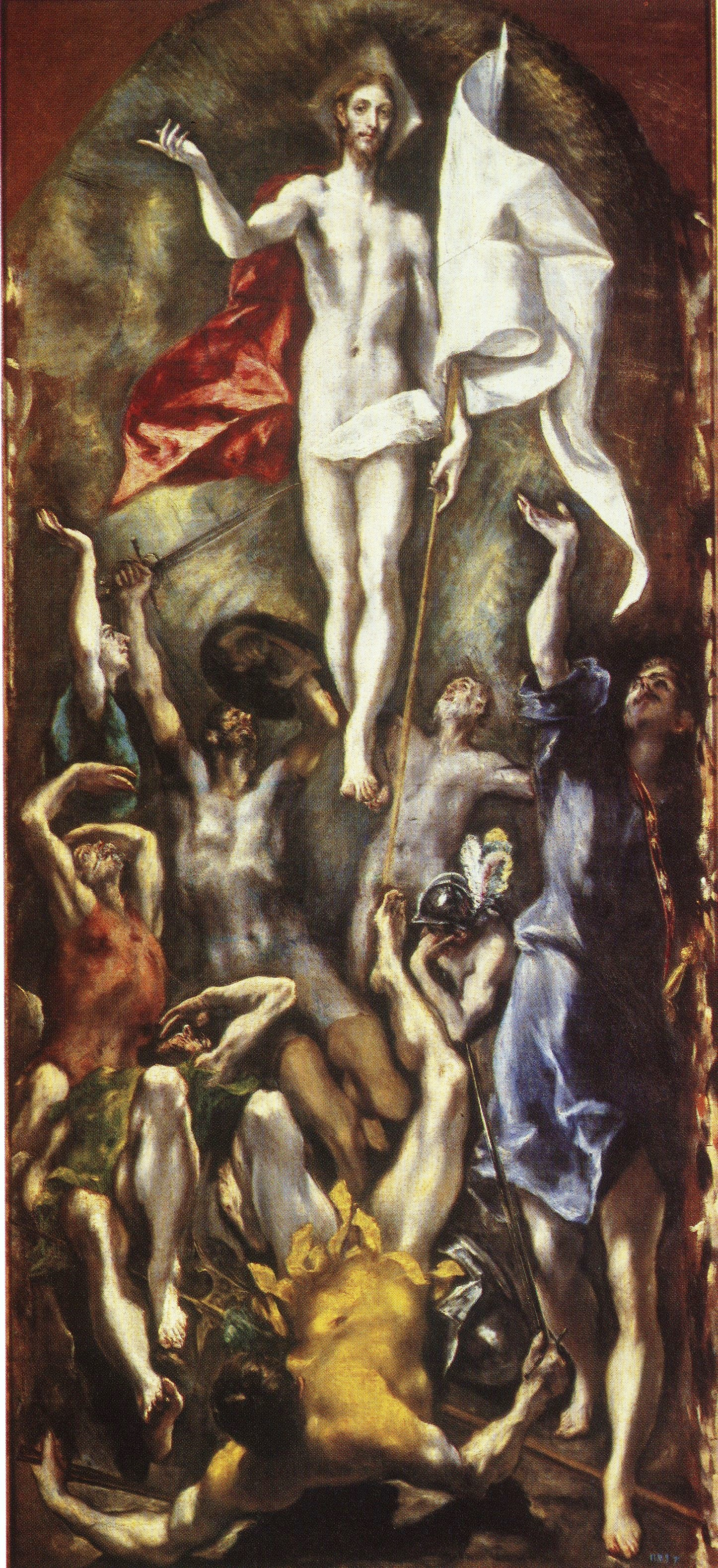 La obra representa a Jesucristo resucitado.